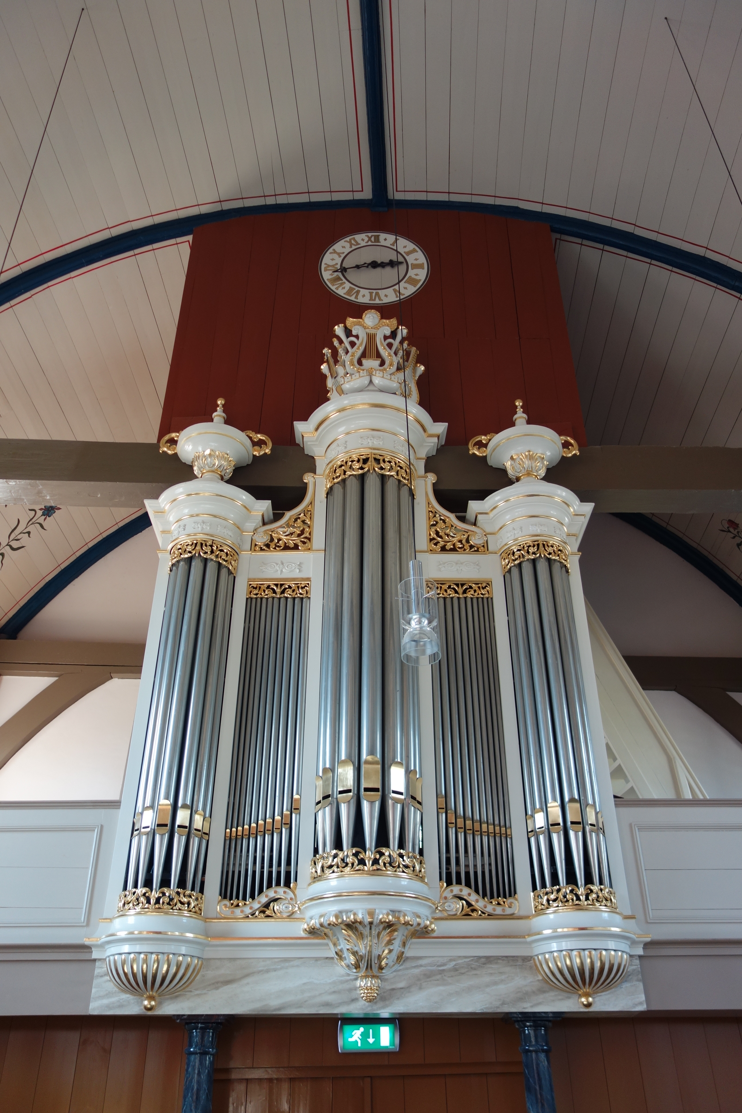 Het orgel van de kerk in Beets. Het is een Flaes en Brünjes-orgel uit 1868. Boven het orgel is de onderkant van de toren te zien, die rust met bijna het volle gewicht op het orgel.